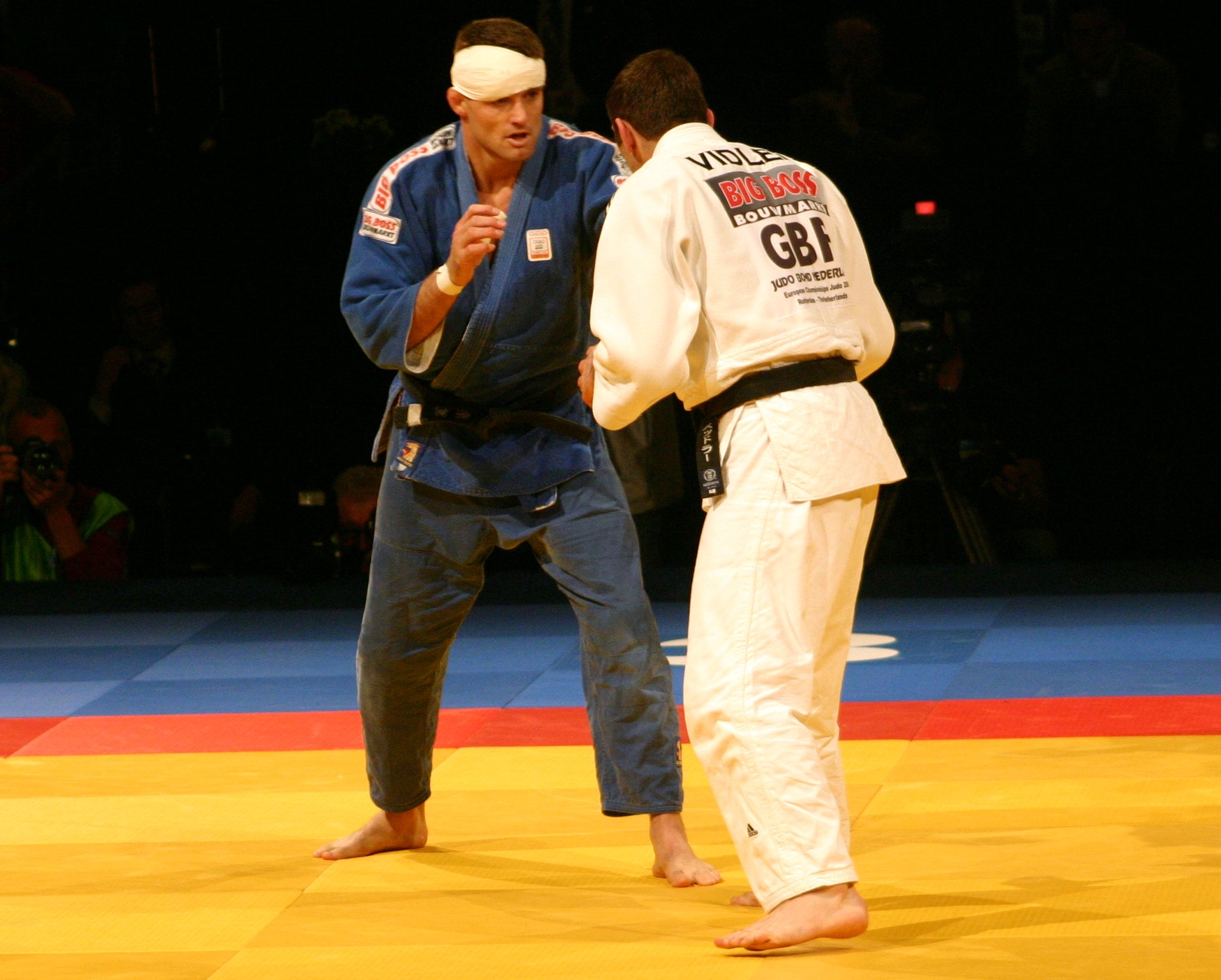 Judoka Mark Huizinga tijdens EK judo in Ahoy Rotterdam